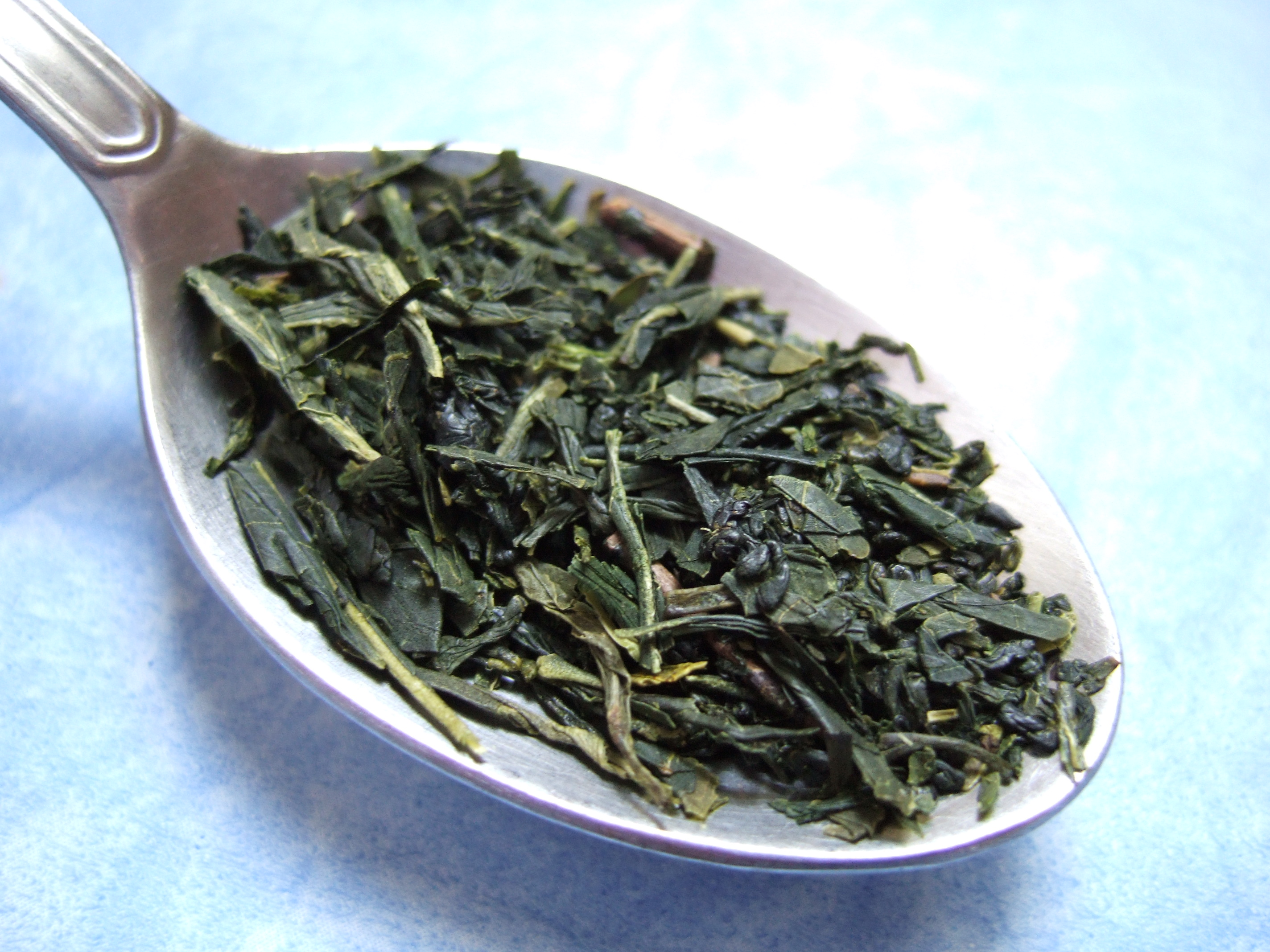 Feuilles de thé vert Fukujyu